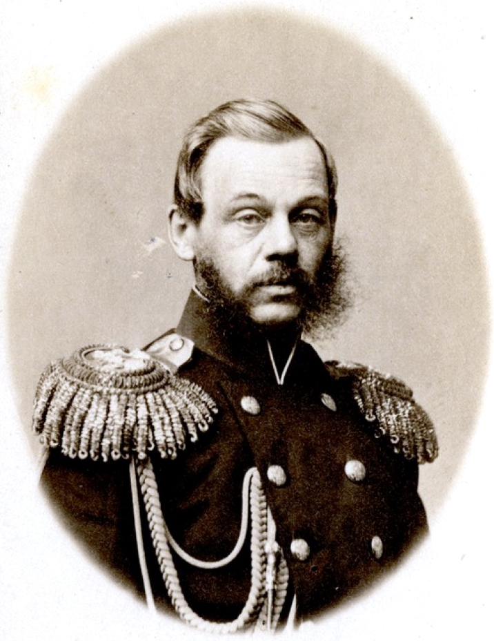 Милютин, Дмитрий Алексеевич